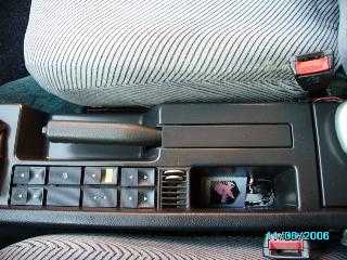 Gabriele